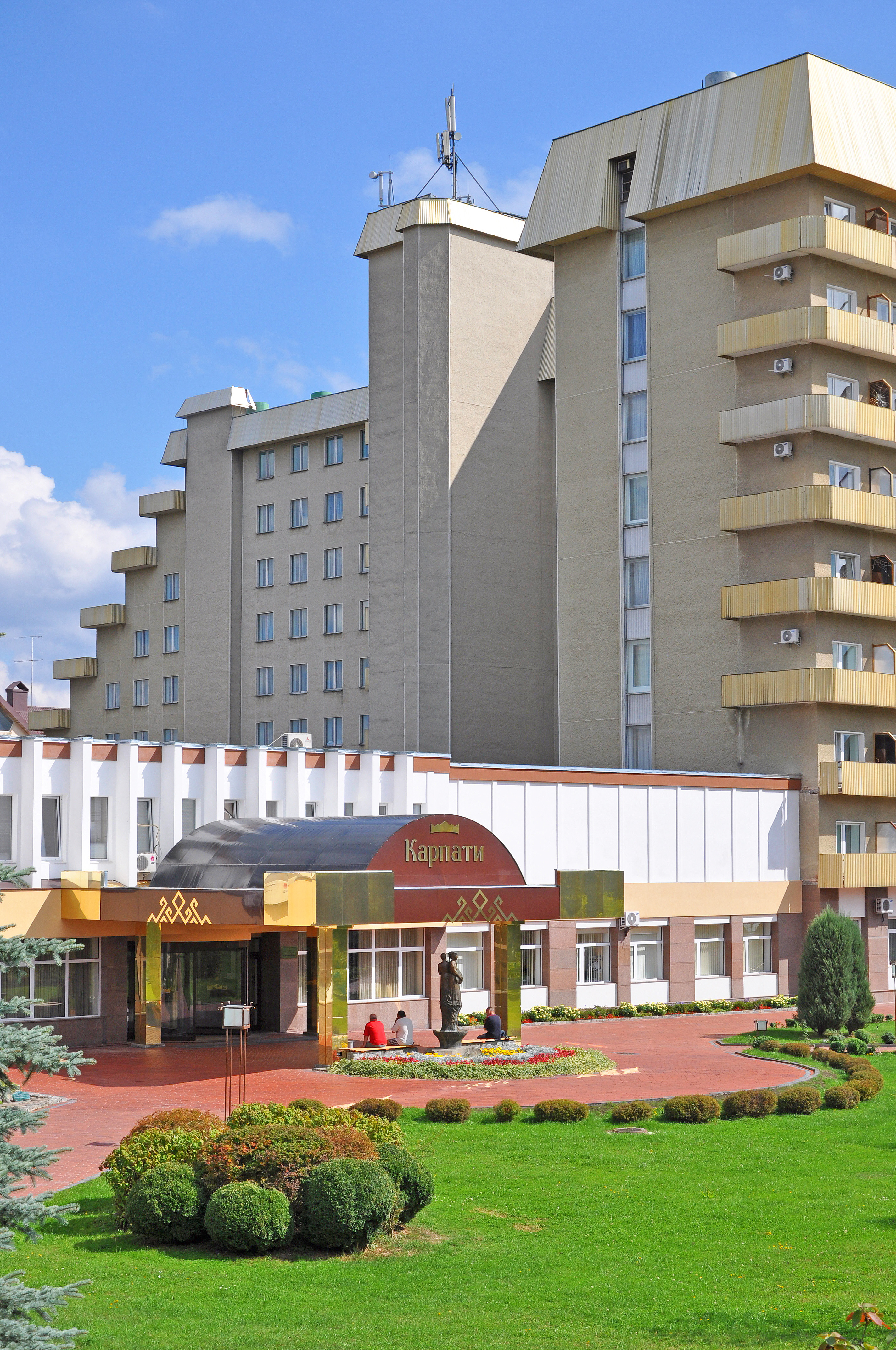 Санаторій Карпати у Трускавці - фасад готелю та центральний заїзд в курортний комплекс